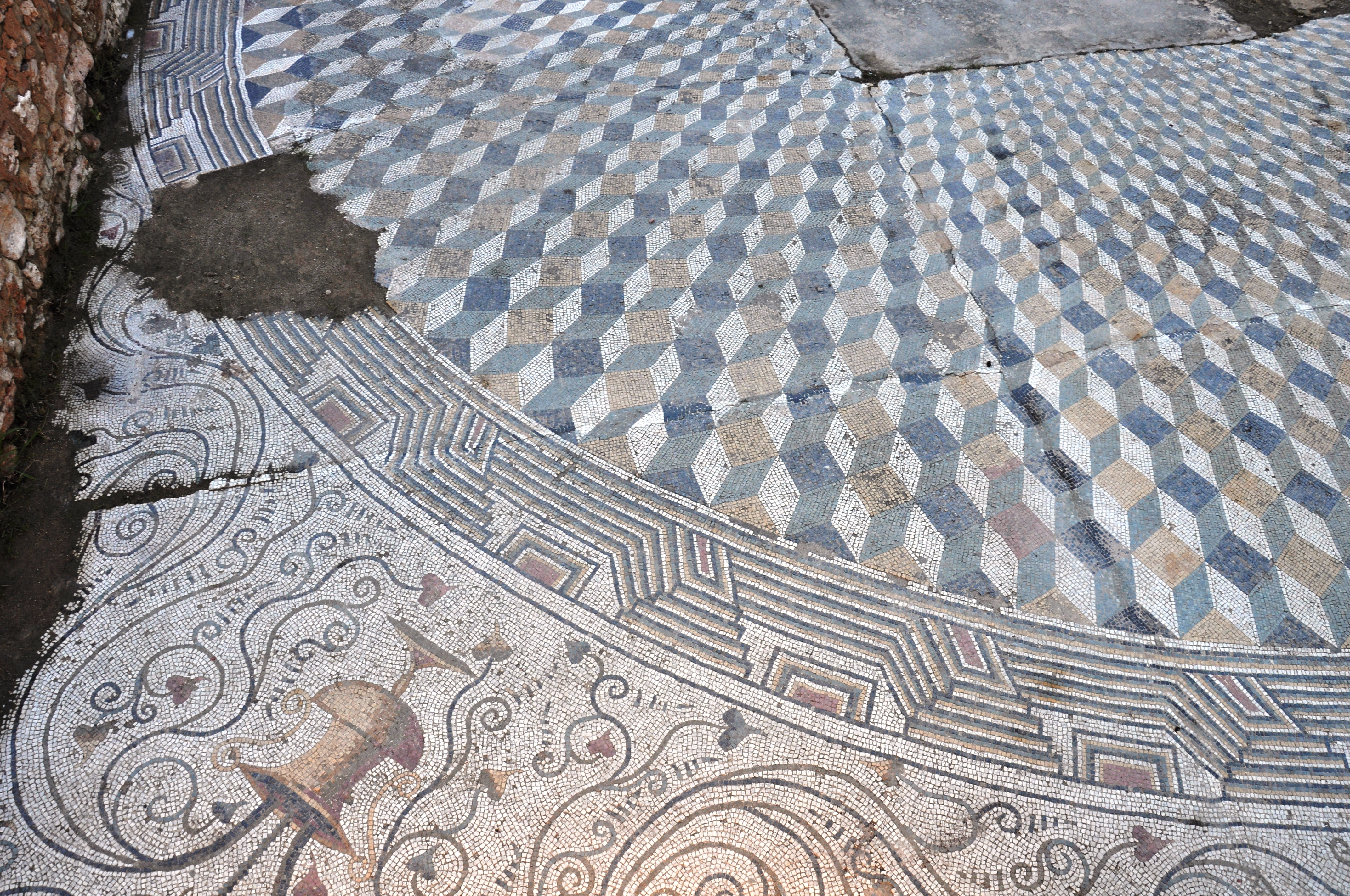 Maison romaine de la redoute des chasseurs